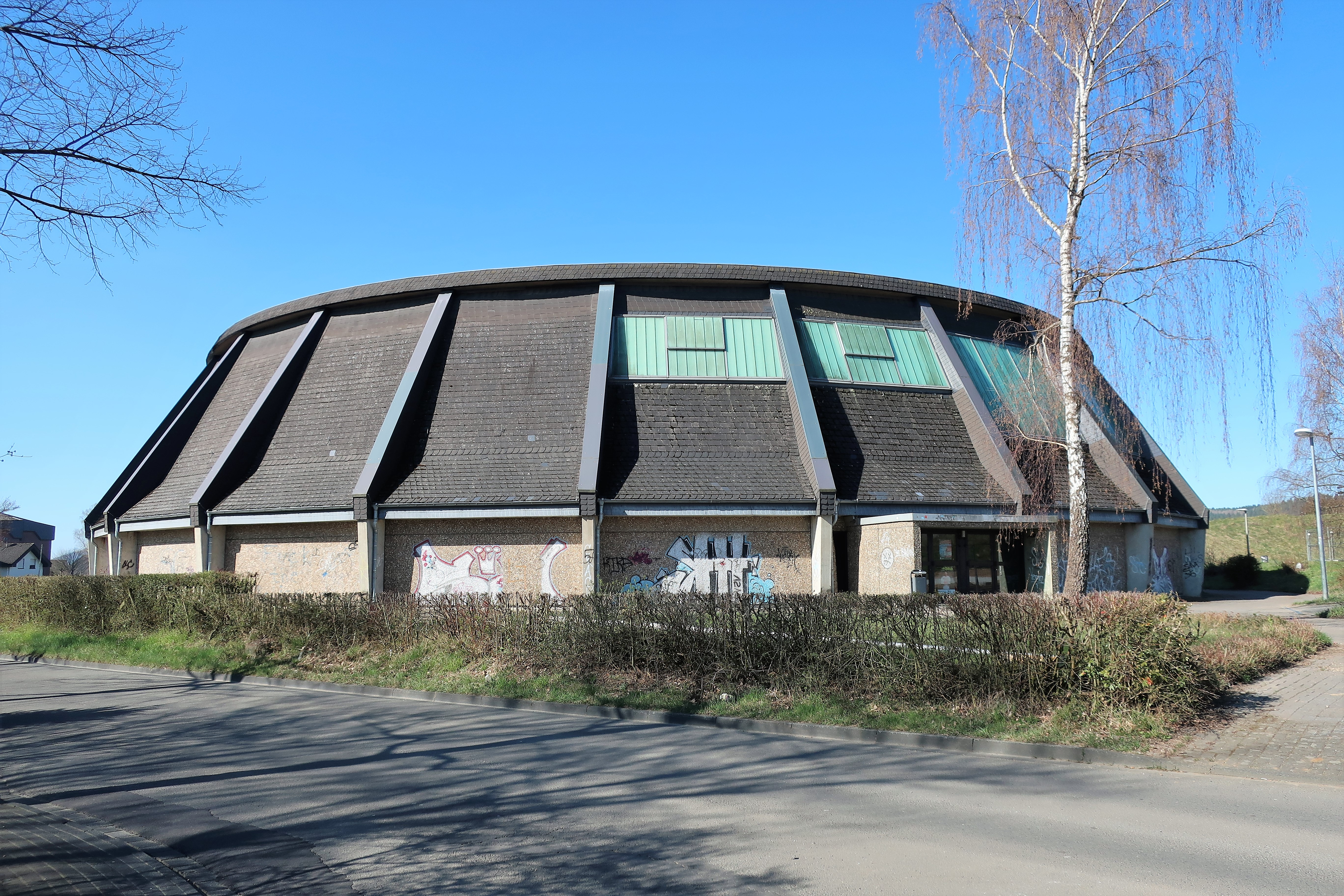 Rundturnhalle in Attendorn, Wiesbadener Straße 5.